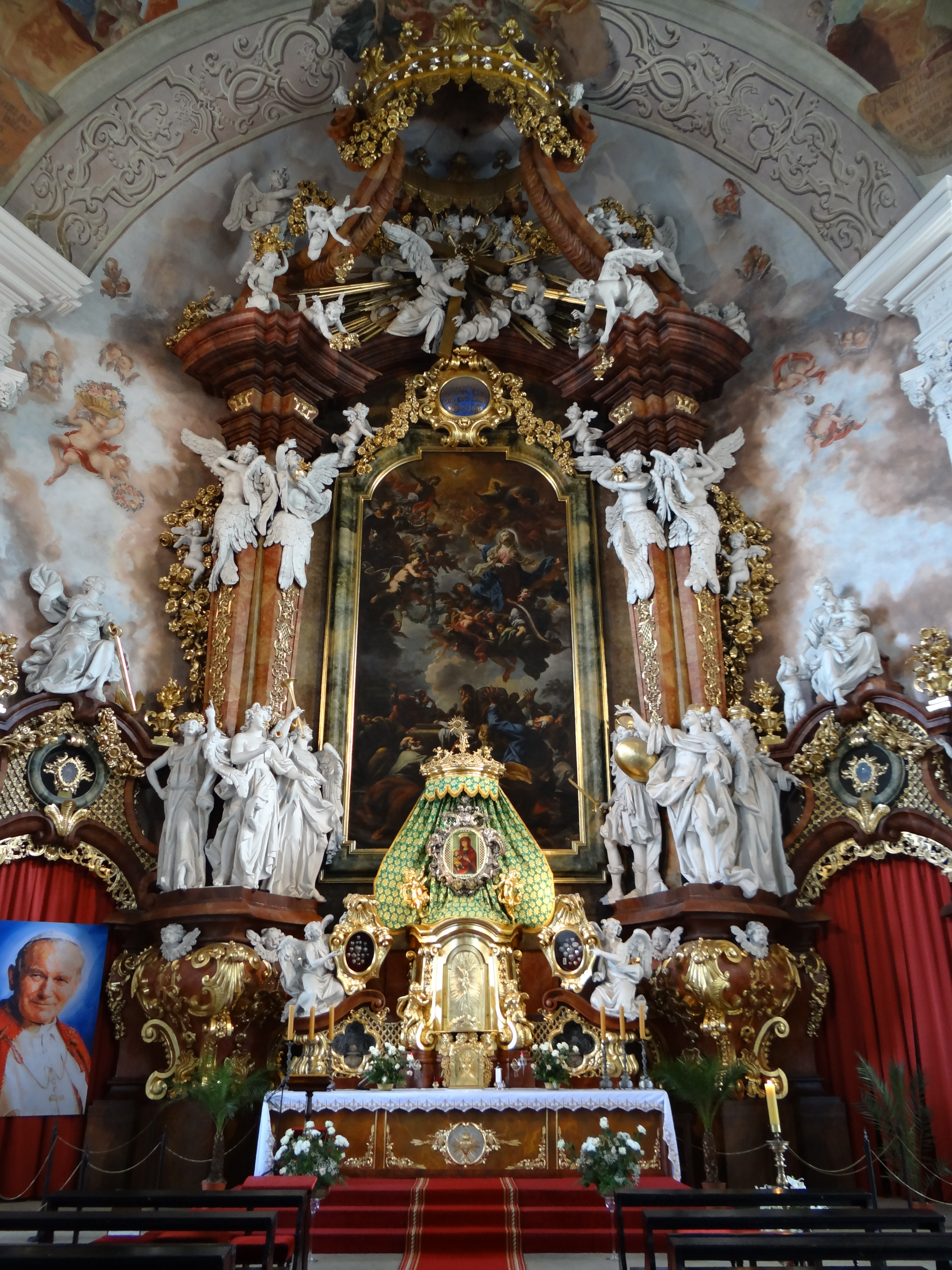 Krzeszów, kościół, ob. par. p.w. Wniebowzięcia NMP, 1728-1735